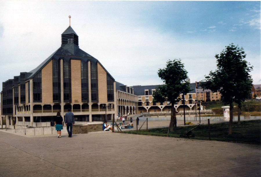 Louvain-la-Neuve, le collège Albert Descamps sur la grand place. 2005 Utilisateur:Jean-Pol GRANDMONT Louvain-la-Neuve (Belgique) - Avril 1984 - "le colllège Albert Descamps". - Photo prise par Jean-Pol Grandmont.